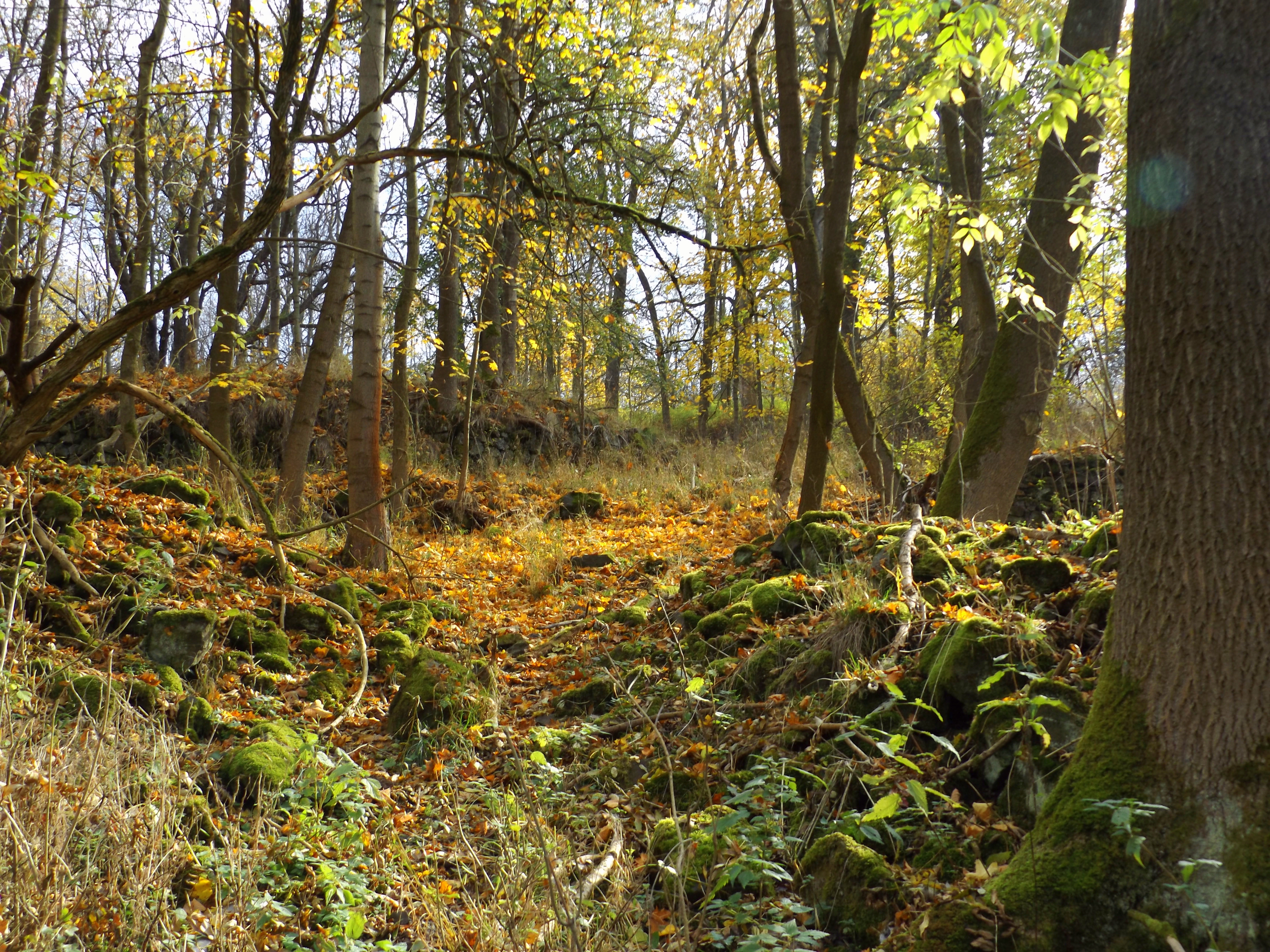 Martinov byl druhým nejvýznamnějším sídlem oblasti Litoltivských vrchů - severní části Doupovských hor.